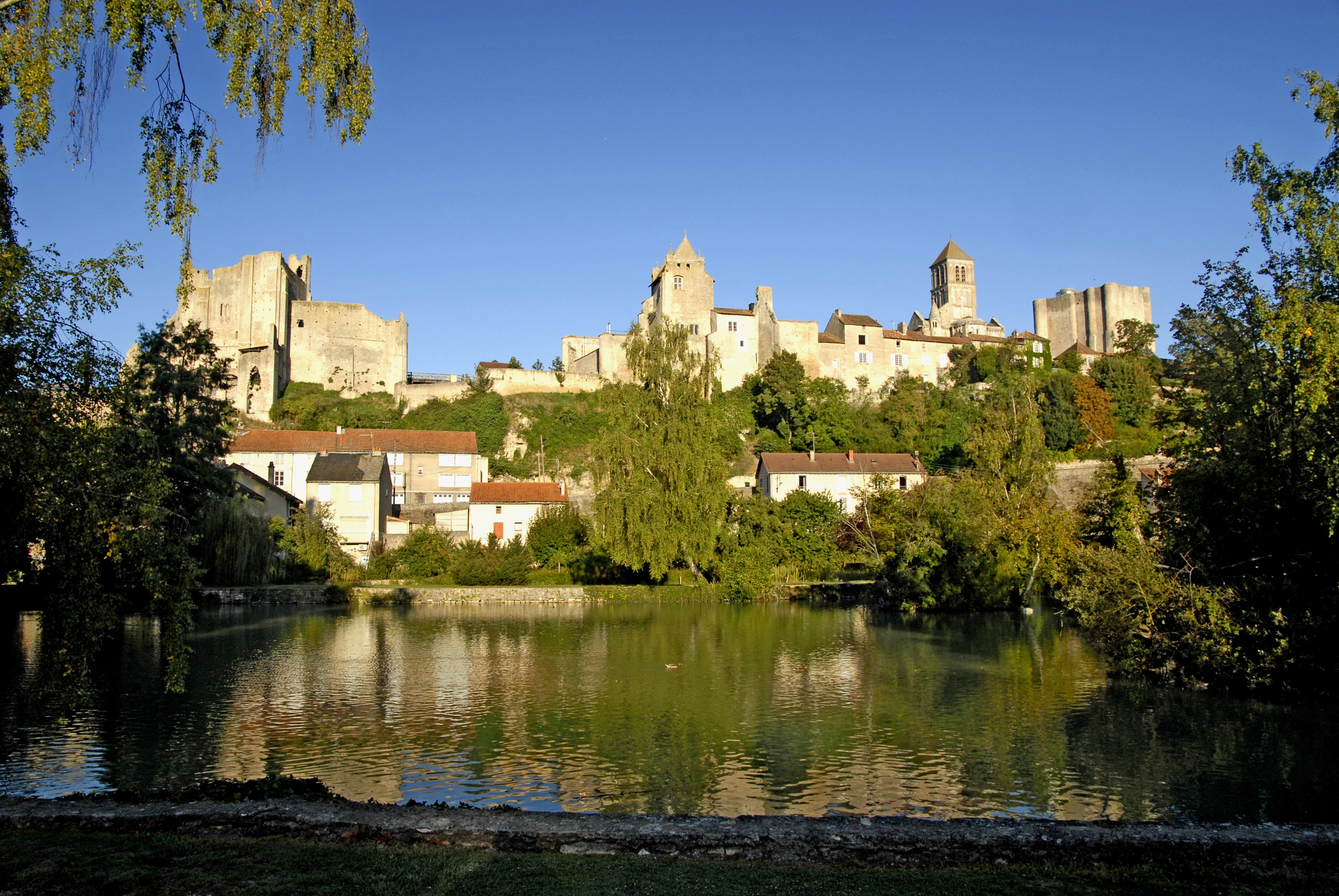 Chauvigny, Gesamtansicht der Burgen